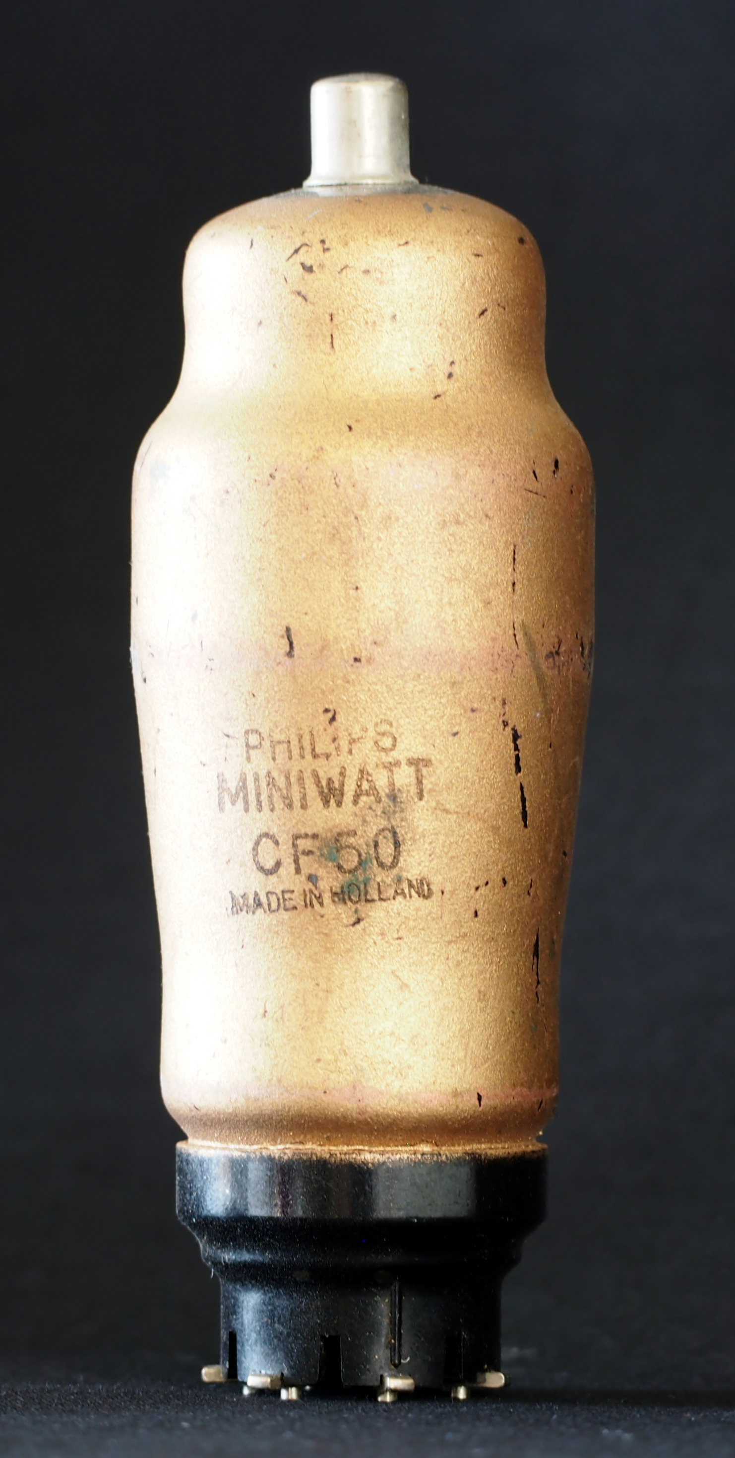 Philips MINIWATT CF50